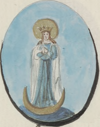 Na niebieskim polu Maria z Nazaretu. Odziana w niebieską szatę. Przykryta srebrnym płaszczem. Pod jej stopami złoty księżyc